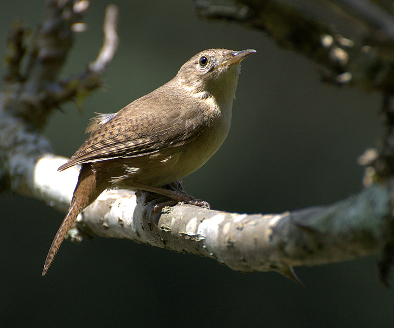 CURRUIRA (Troglodytes aedon), Jardim Botânico de São Paulo